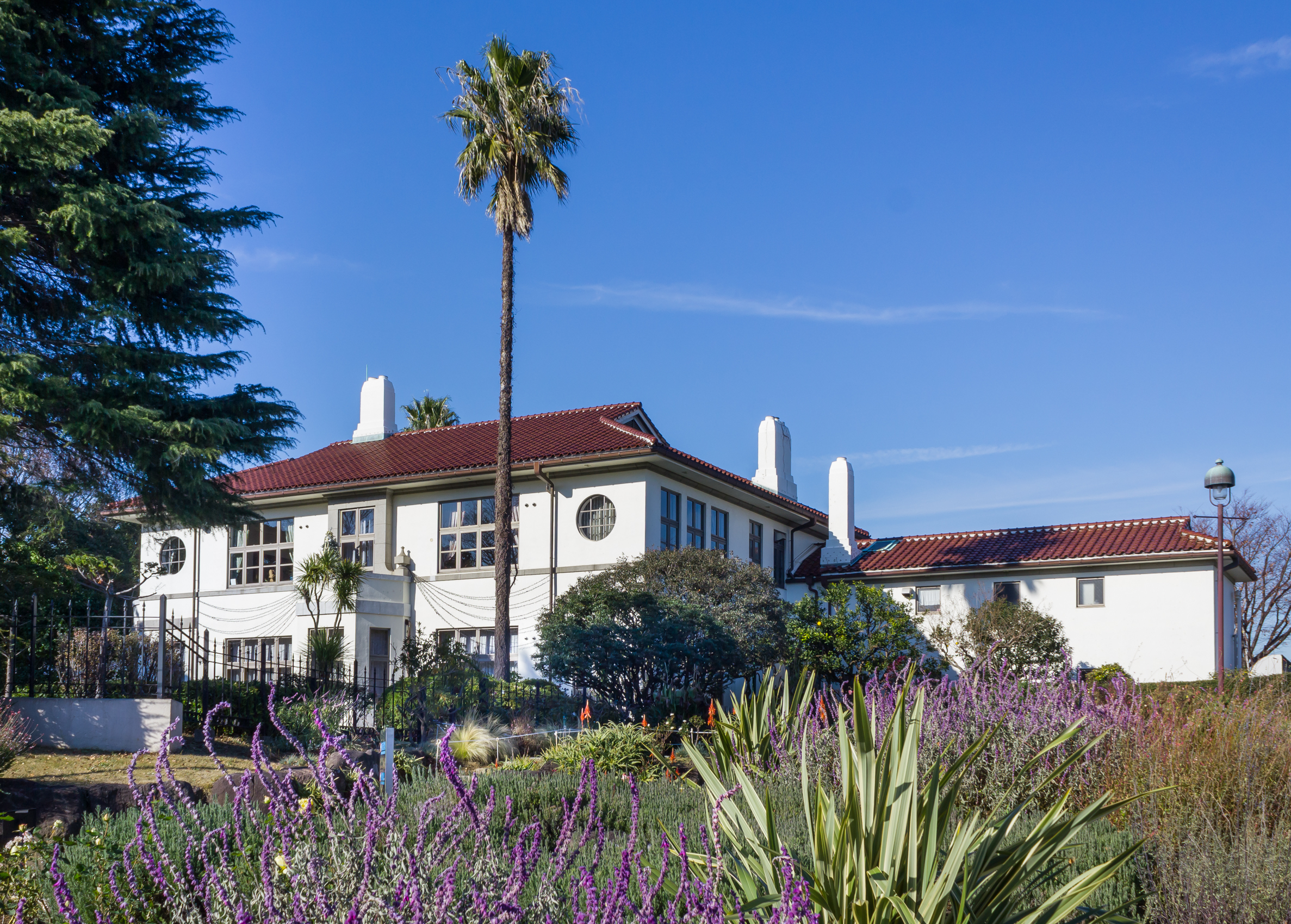 横浜市イギリス館（横浜市中区山手町）